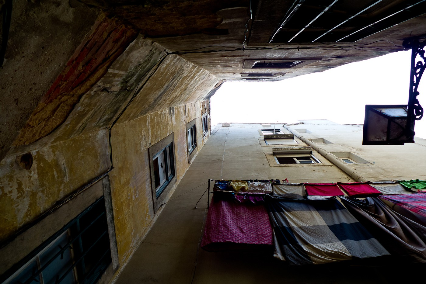 Patio de vecinos